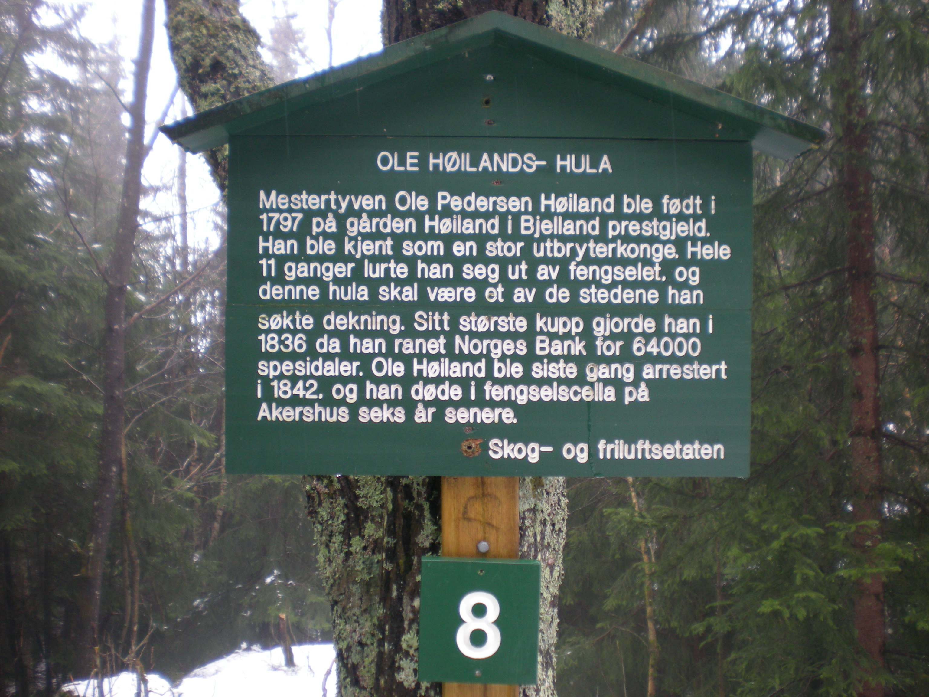 Oslo kommune Friluftsetatens skilt vedr. Ole Høilands hule i Lillomarka, Oslo.